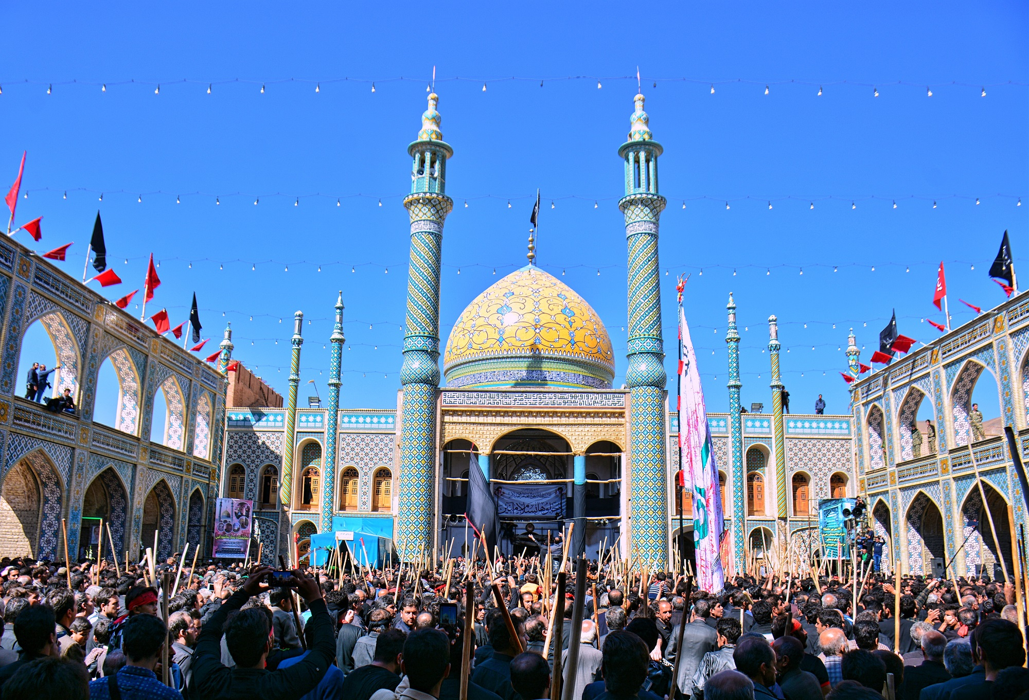 امامزاده مشهد اردهال